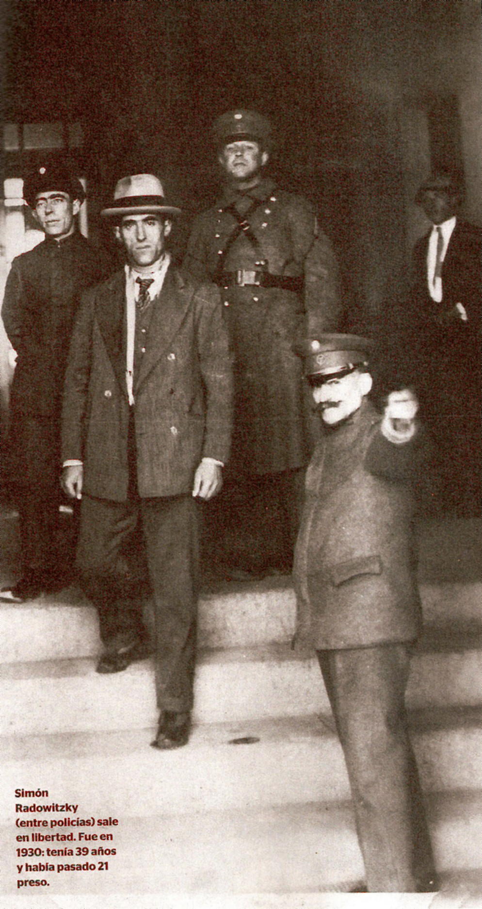 El anarquista Simon Radowitzky sale en libertad tras haber estado preso 21 años por matar al comisario Ramón Falcón.